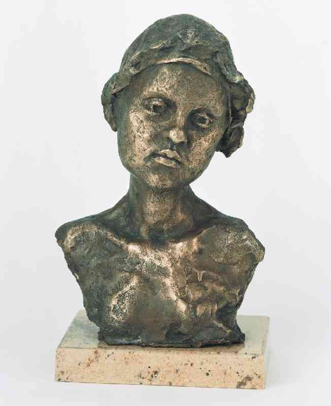 Rzeźba wykonana przez Dorotę Dziekiewicz-Pilich - "Głowa Madzi", brąz, 31 cm x 19 cm, 1993